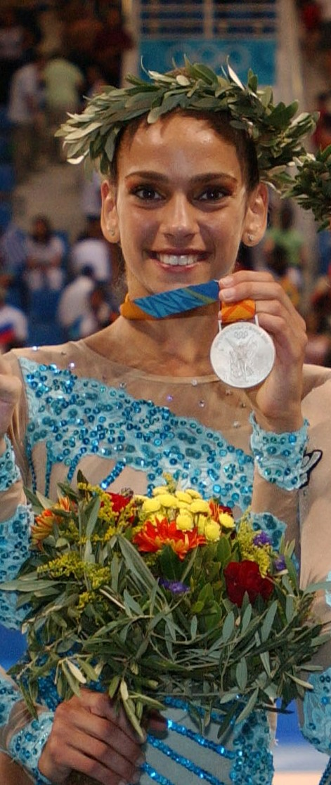 Elisa Santoni medaglia d'Argento all'Olimpiade di Atene 2004